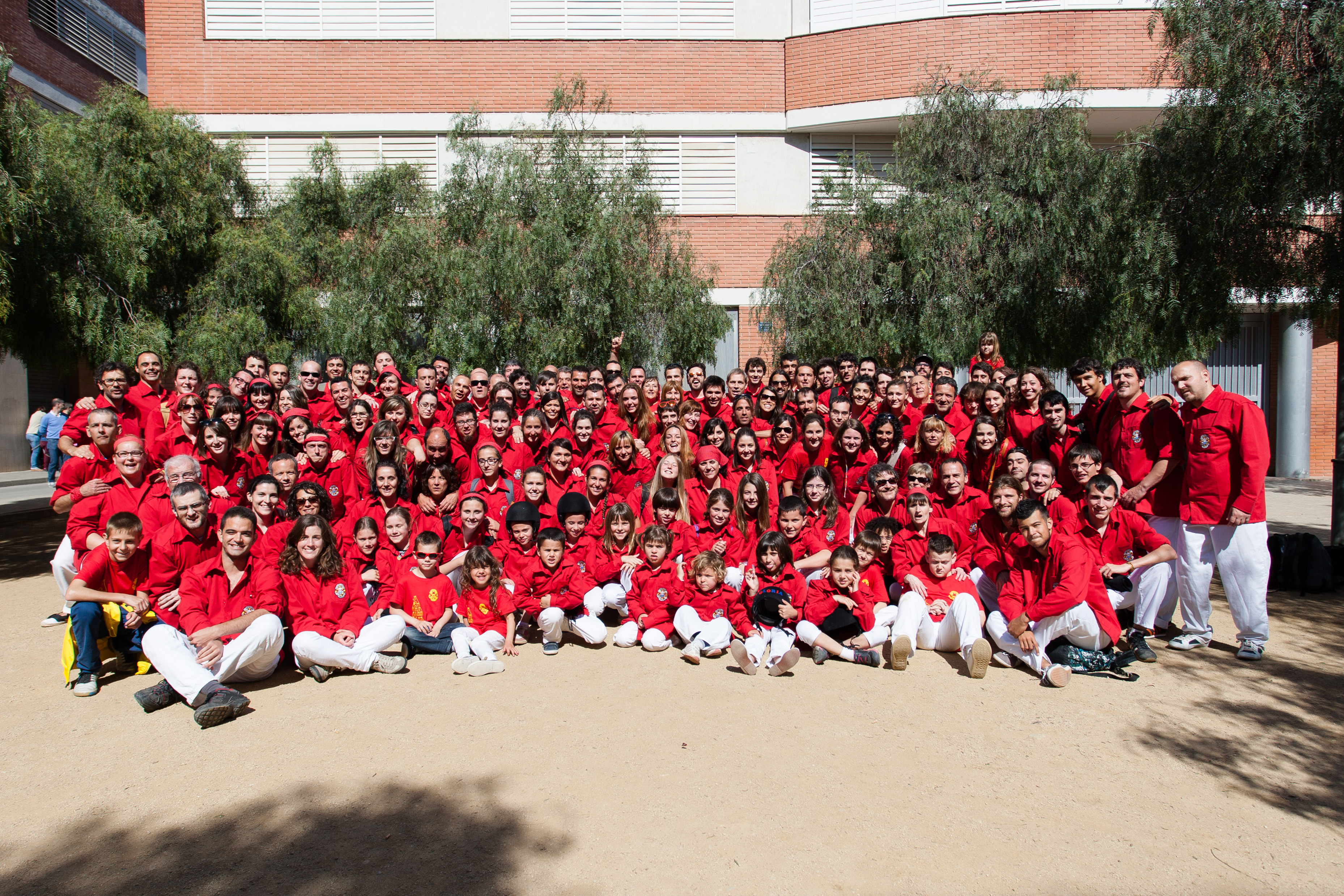 Els Maduixots el dia del seu bateig (26/04/2014). Foto de Guillem Costas.